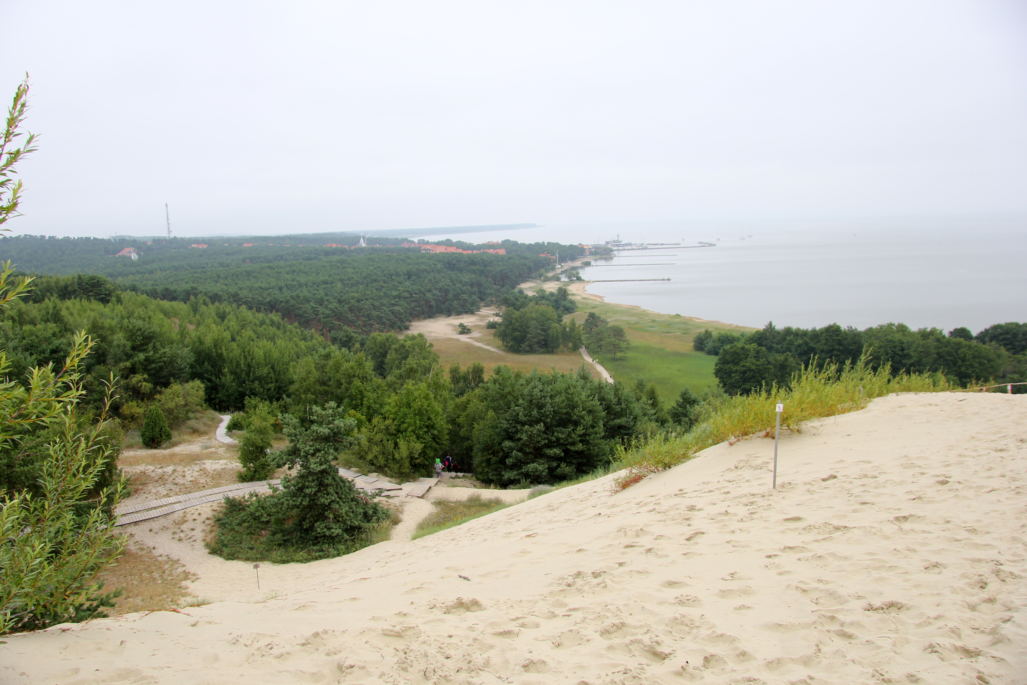 Curonian Spit. Kuršių nerija.Kuršu kāpas